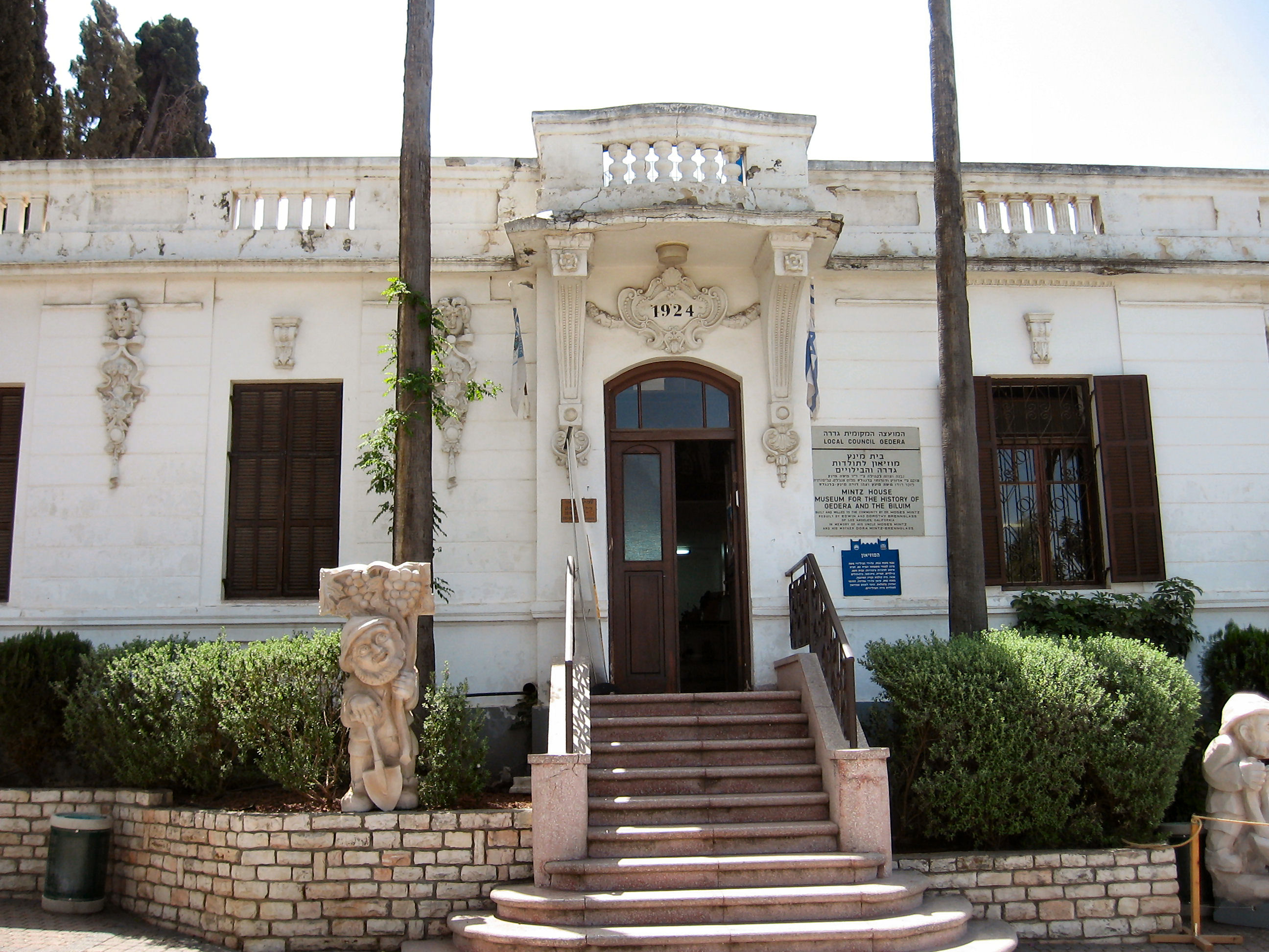 בית מינץ מוזאון גדרה רישיון נוצר על ידי משתמש:Daniel Ventura